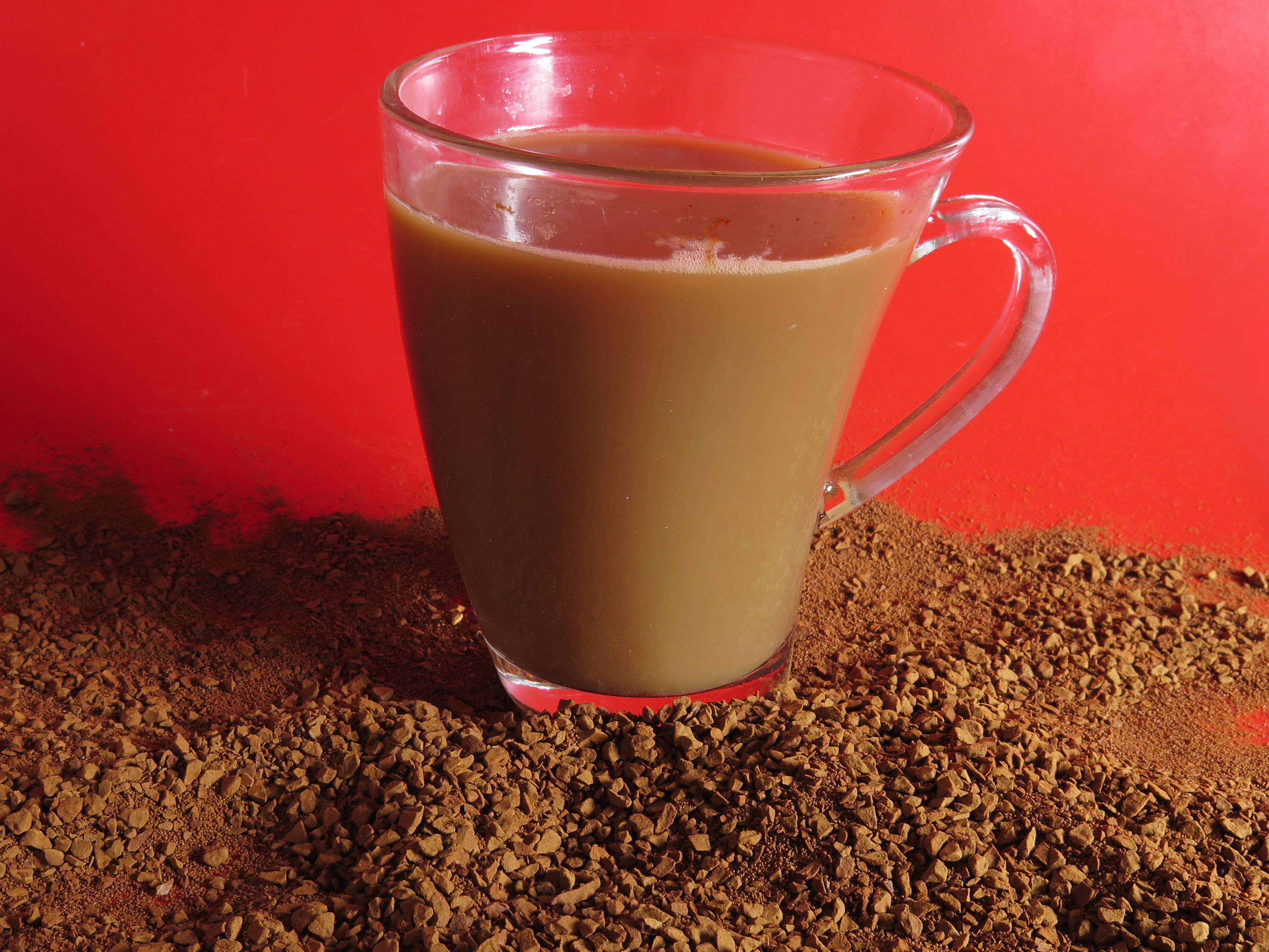 כוס נס קפה